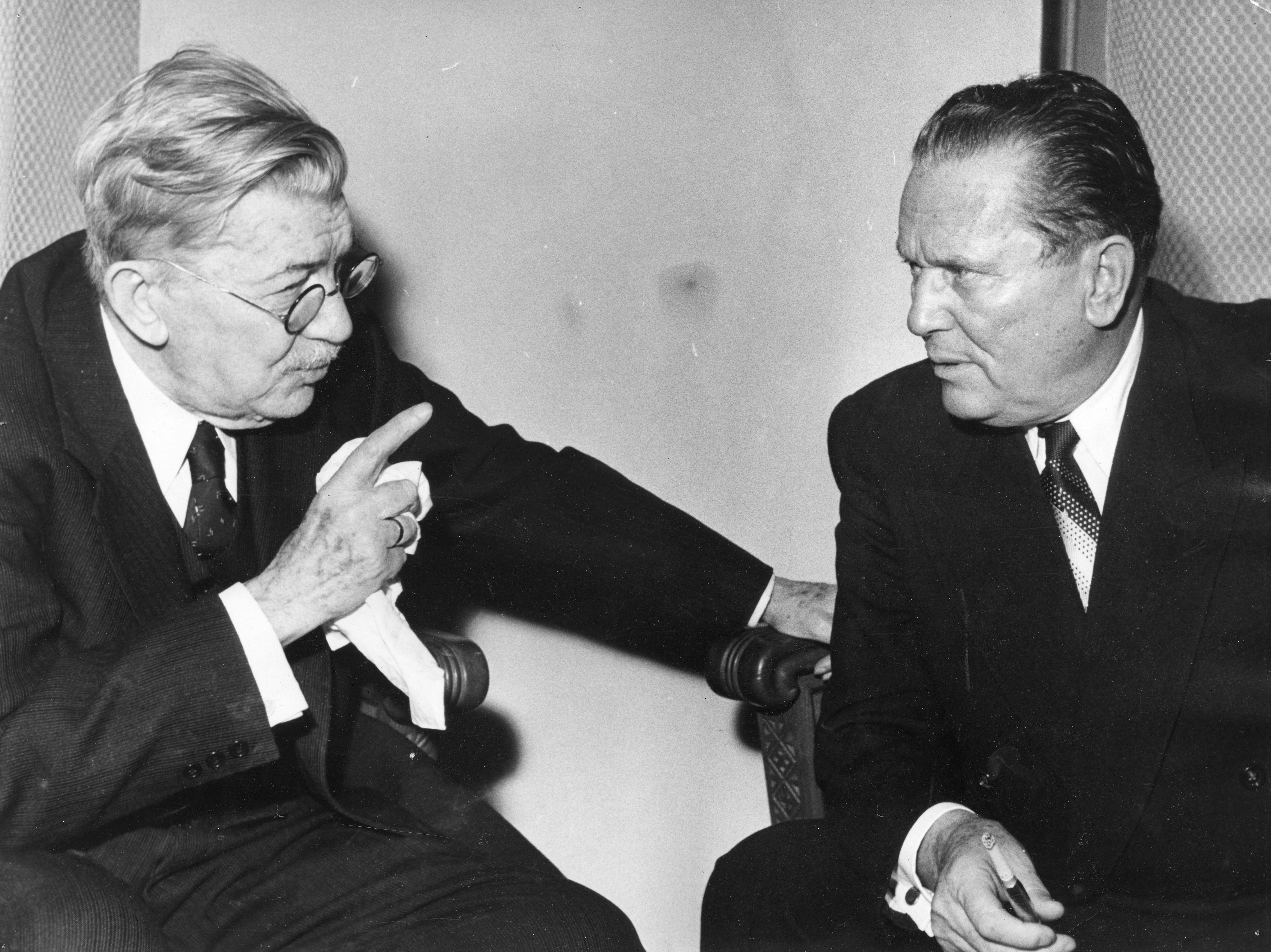 Josip Broz Tito u razgovoru s predsednikom SANU Aleksandrom Belićem, 1954.foto: Stevan Kragujević (po odobrenju kćerke Tanje Kragujević)